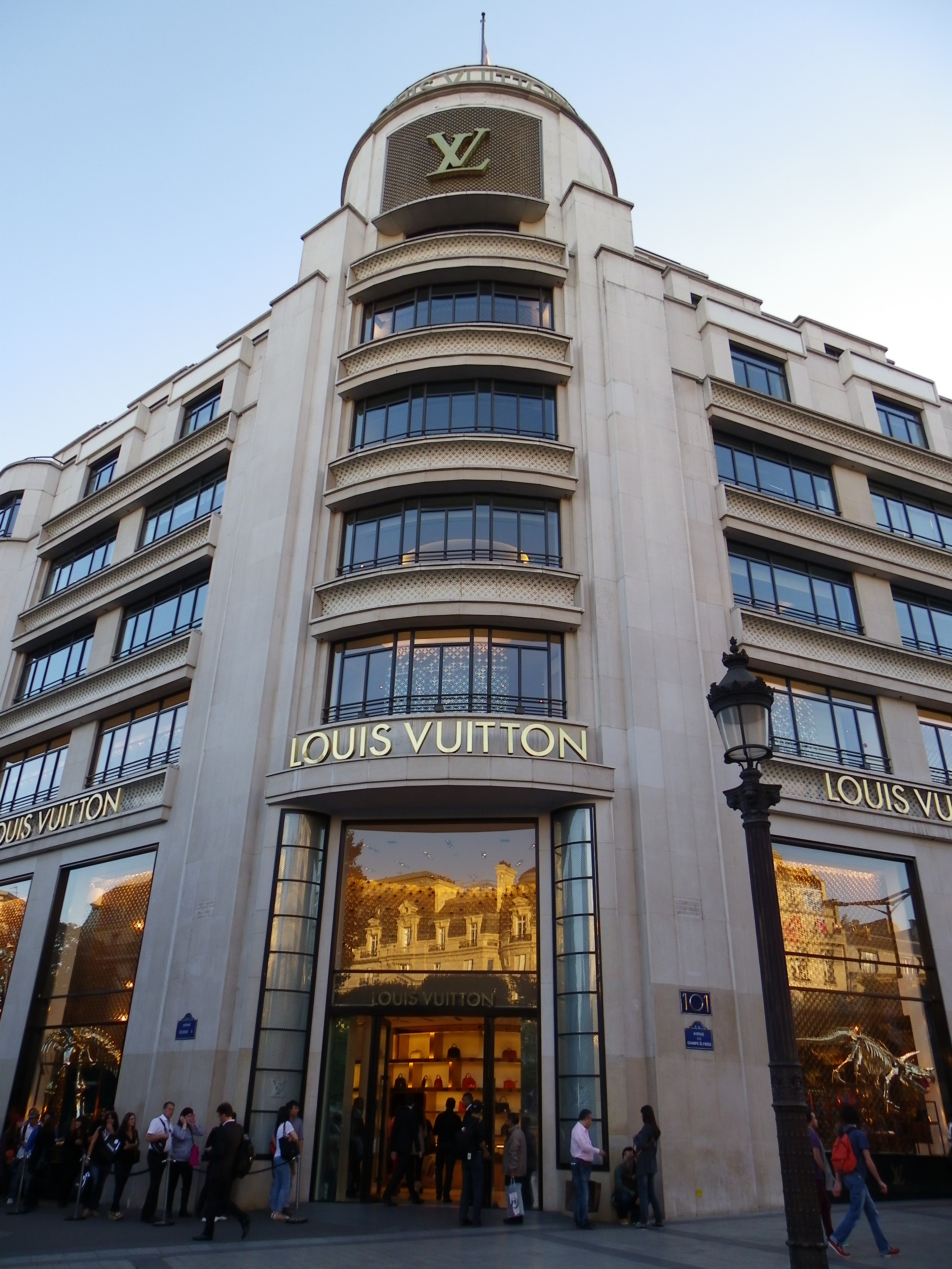 Boutique Louis Vuitton au 101 avenue des Champs-Elysées à Paris - Charles-Henri Besnard, architecte.